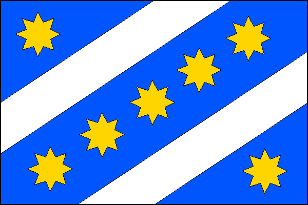 vlajka, Vyšehoří, okres Šumperk